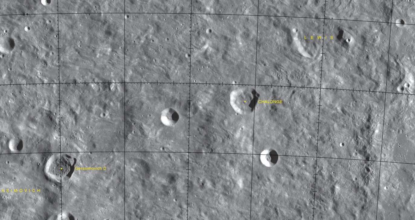 Cráter Chalonge. Localización (LRO)